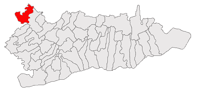 Categorie:Hărţi ale judeţului Călăraşi